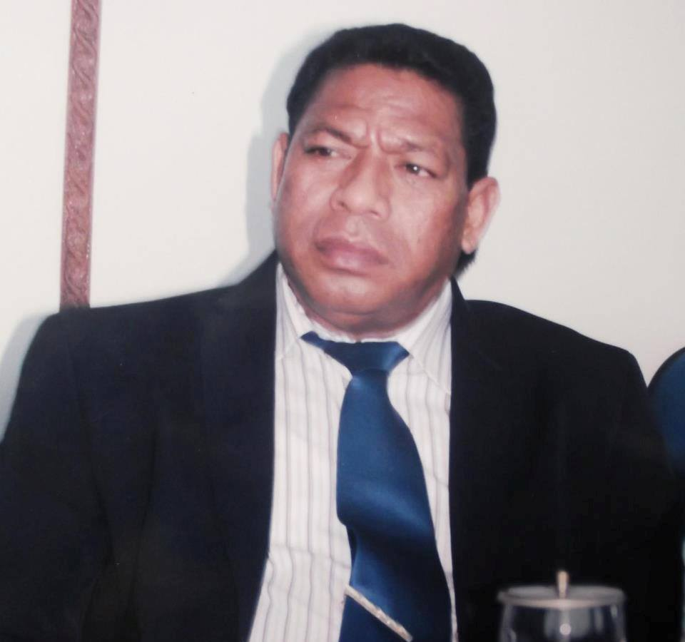 Tetun: ne'e hau nia fotografia